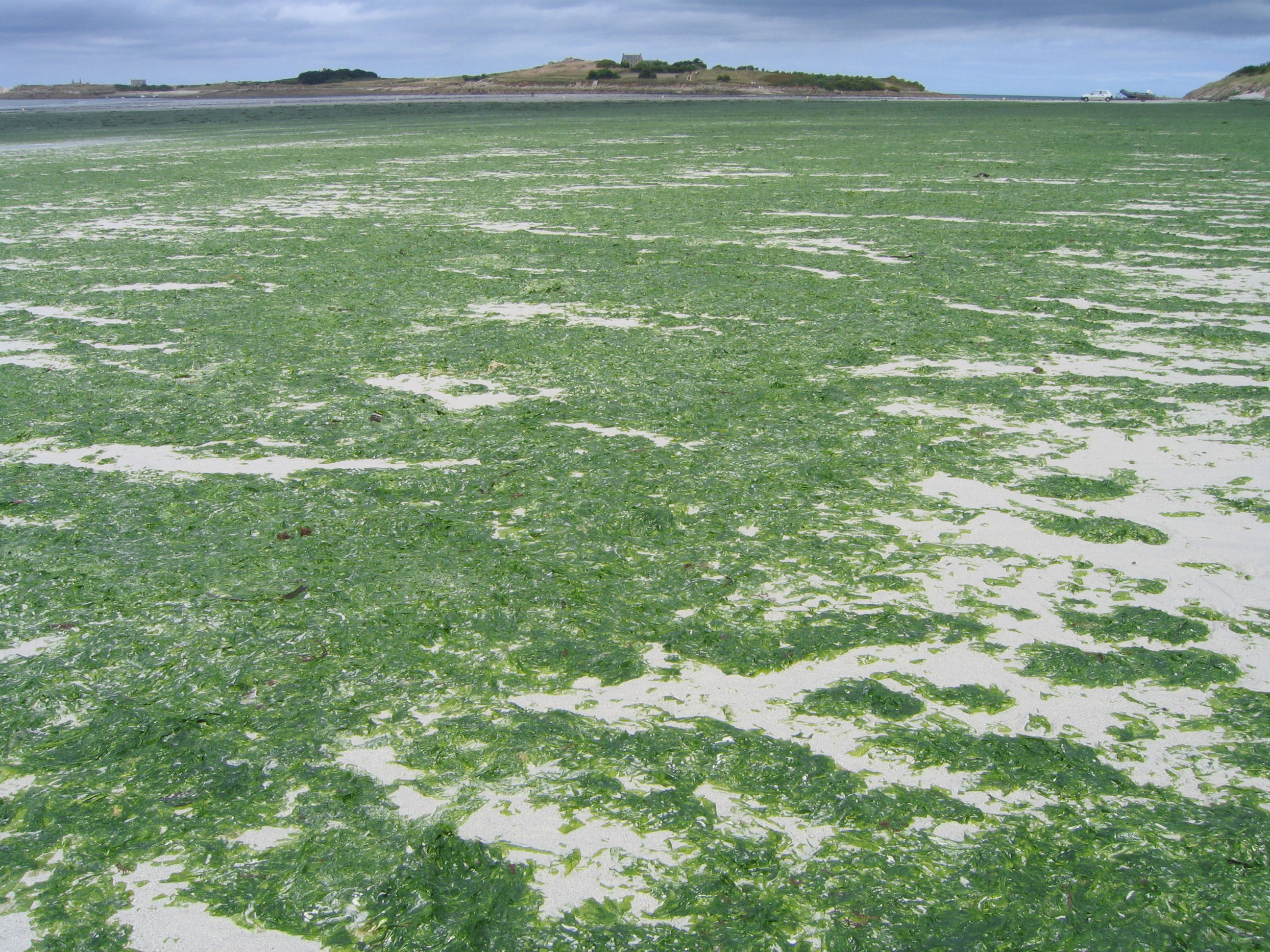 Des algues Ulva Armoricana lors d'une marée verte dans le nord Finistère (Plage du Dossen et île de Sieck, commune de Santec).